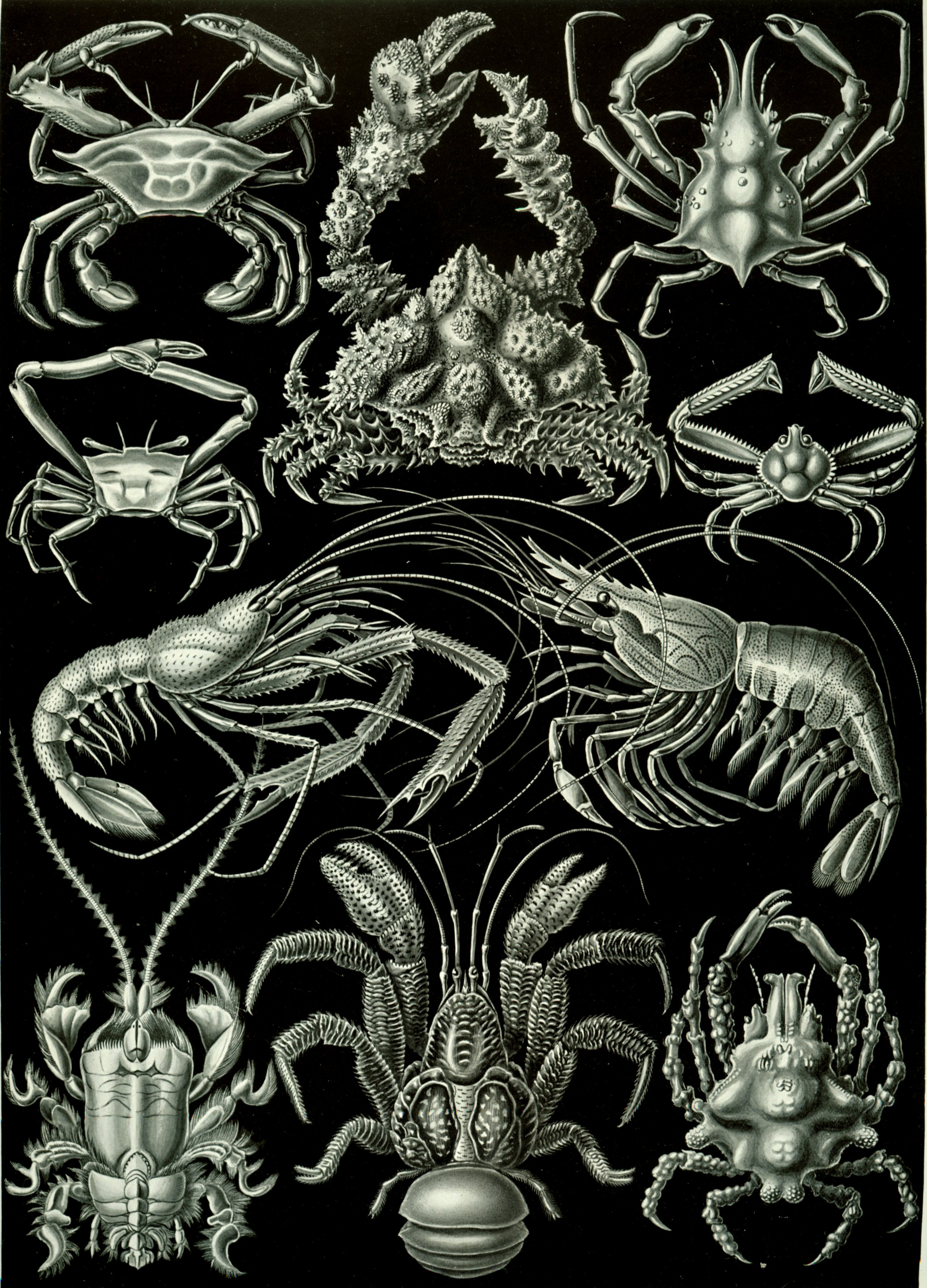 Parthenope horrida (Fabricius) = Daldorfia horrida (Linnaeus, 1758) Podophthalmus vigil (Leach) = Podophthalmus vigil (Fabricius, 1798) Pisa armata (Leach) = Pisa armata (Latreille, 1803) Gonoplax rhomboides (Desmarest) = Goneplax rhomboides (Linnaeus, 1758) Pisolambrus nitidus (Milne Edwards) = Solenolambrus tenellus Stimpson, 1871 Stenopus hispidus (Latreille) = Stenopus hispidus (Olivier, 1811) Palaemon serratus (Fabricius) = Palaemon serratus (Pennant, 1777) Albunea symnista (Fabricius) = Albunea symmysta (Linnaeus, 1758) Lissa chiragra (Leach) = Lissa chiragra (Fabricius, 1775) Birgus latro (Herbst) = Birgus latro (Linnaeus, 1767)